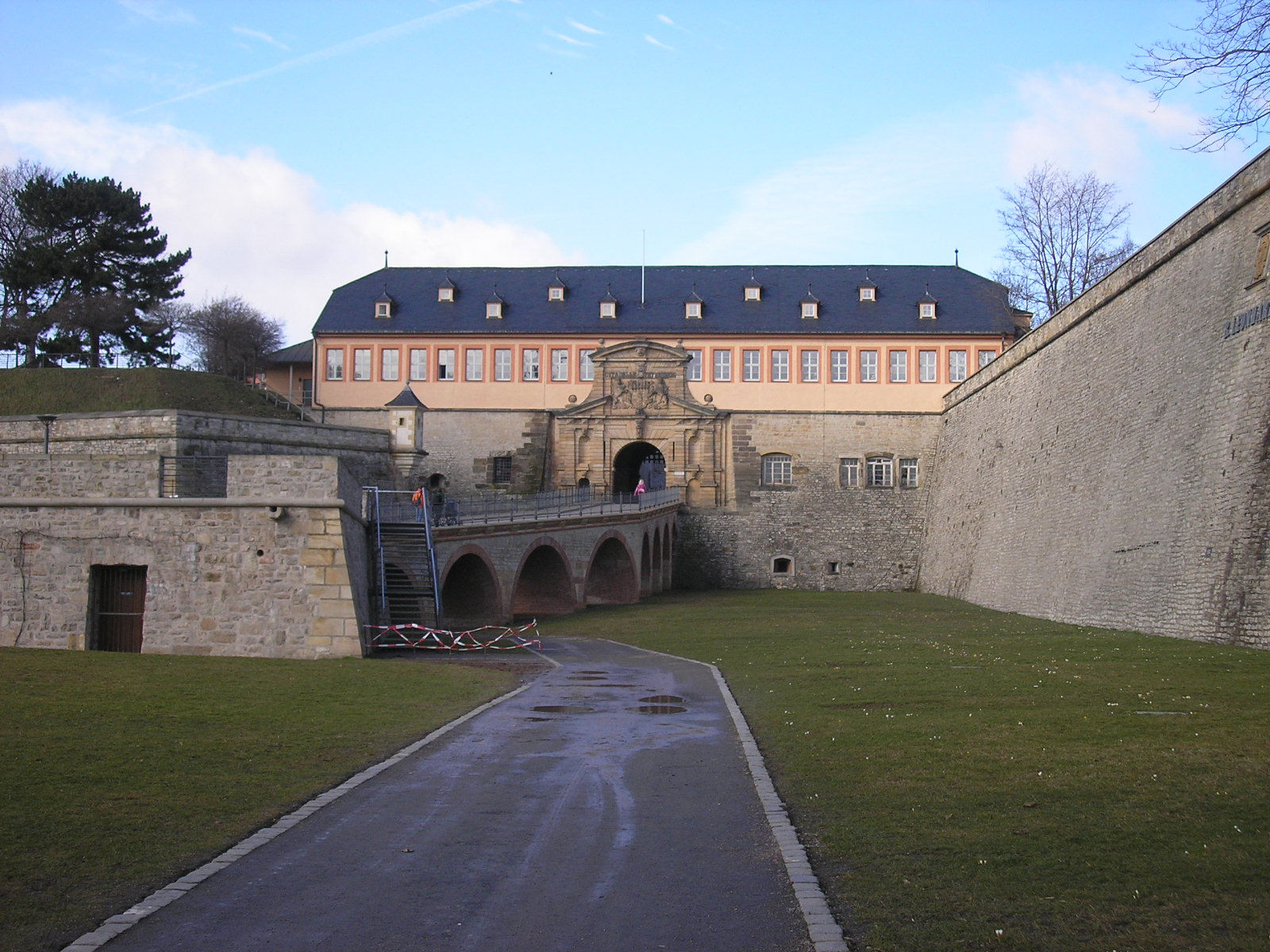 Der Eingang der Zitadelle Petersberg in Erfurt (Thüringen).